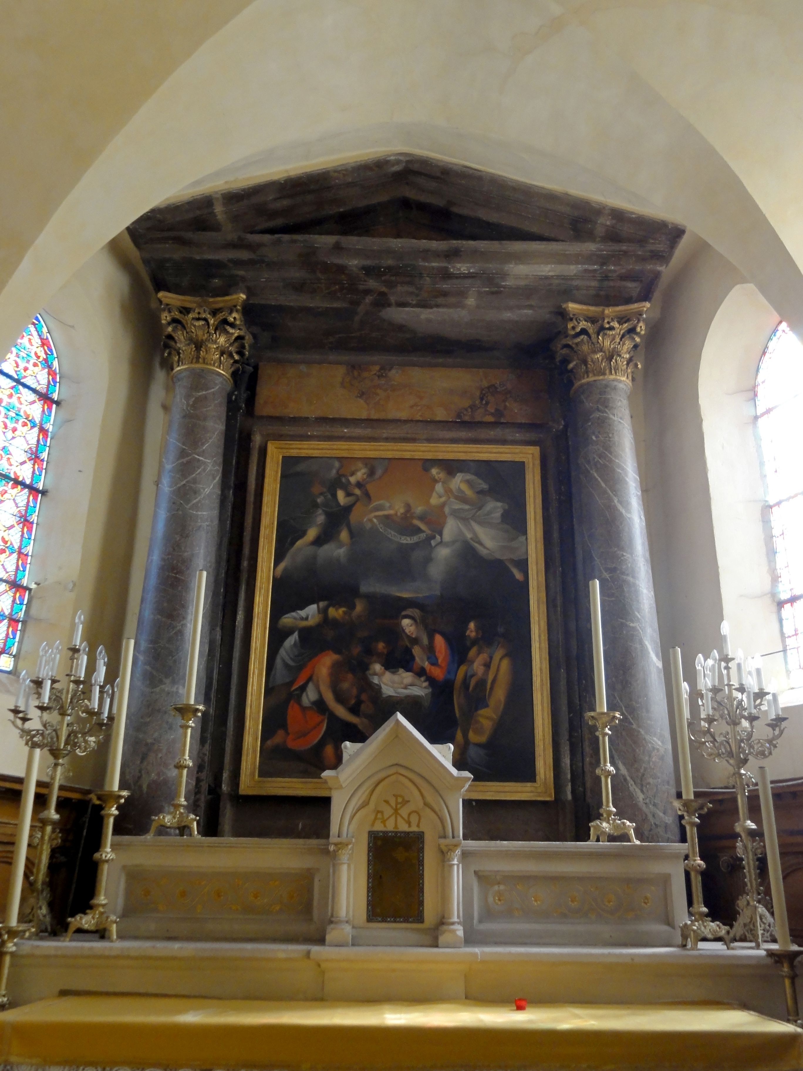 Retable du maître-autel.